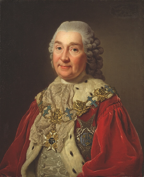 Carl Fredrik Scheffer, svensk, Född 1715, Död 1786. Avmålad av: Alexander Roslin, svensk, Född 1718, Död 1793. Nationalmuseums inventarienummer: NMGrh 1063 Förvärv: Övertagande 1866 från Gripsholms slott